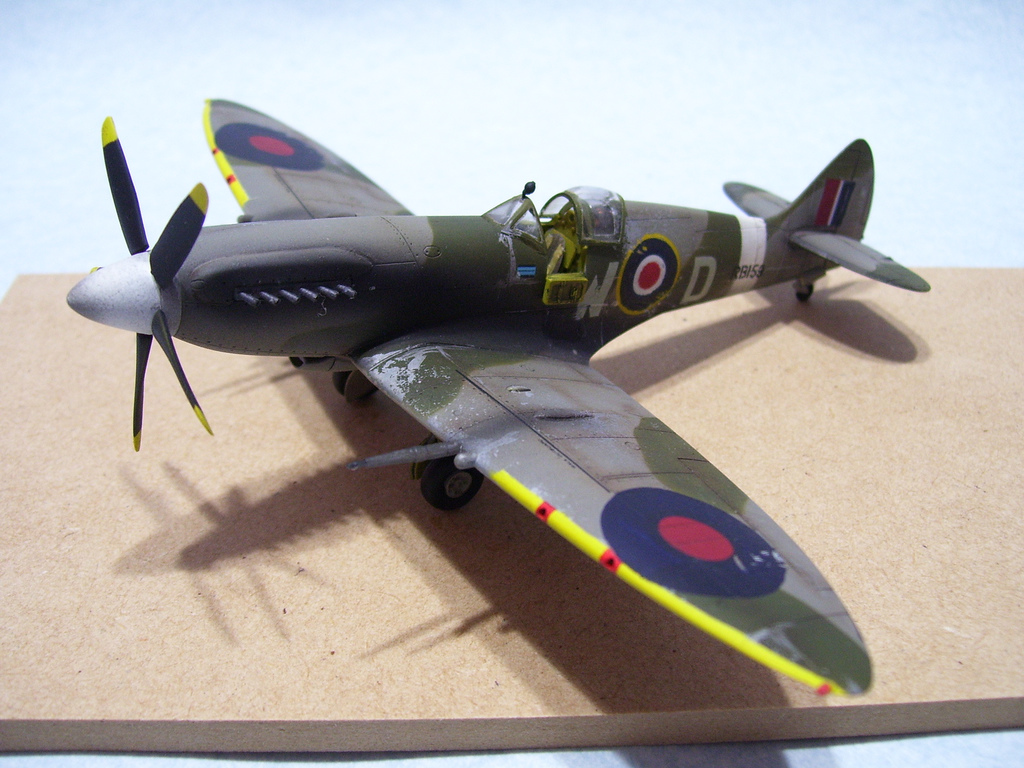 1/72 scale spitfire mk.XIV